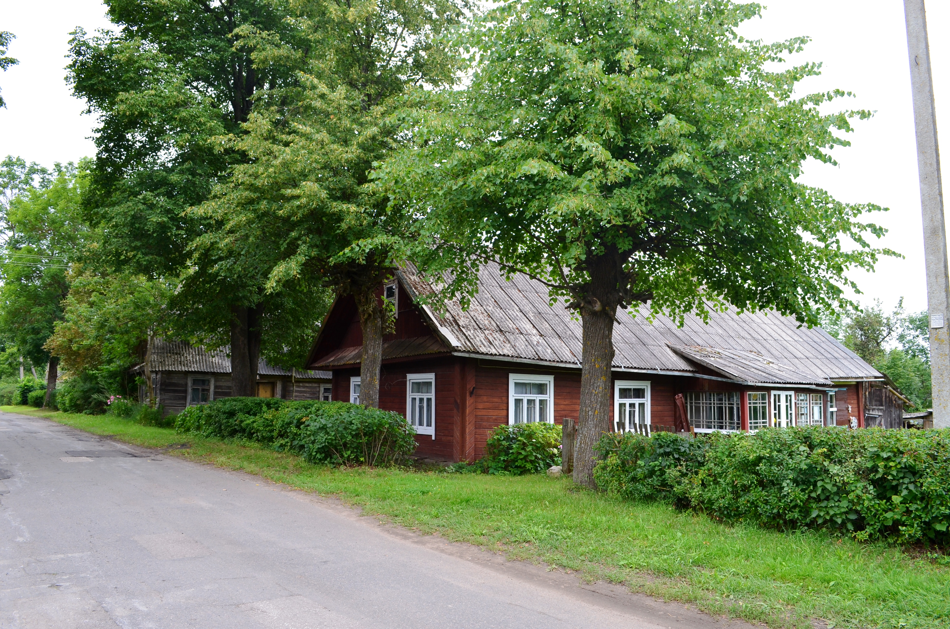 Č. Kudabos g., Tverečius, Ignalinos raj.